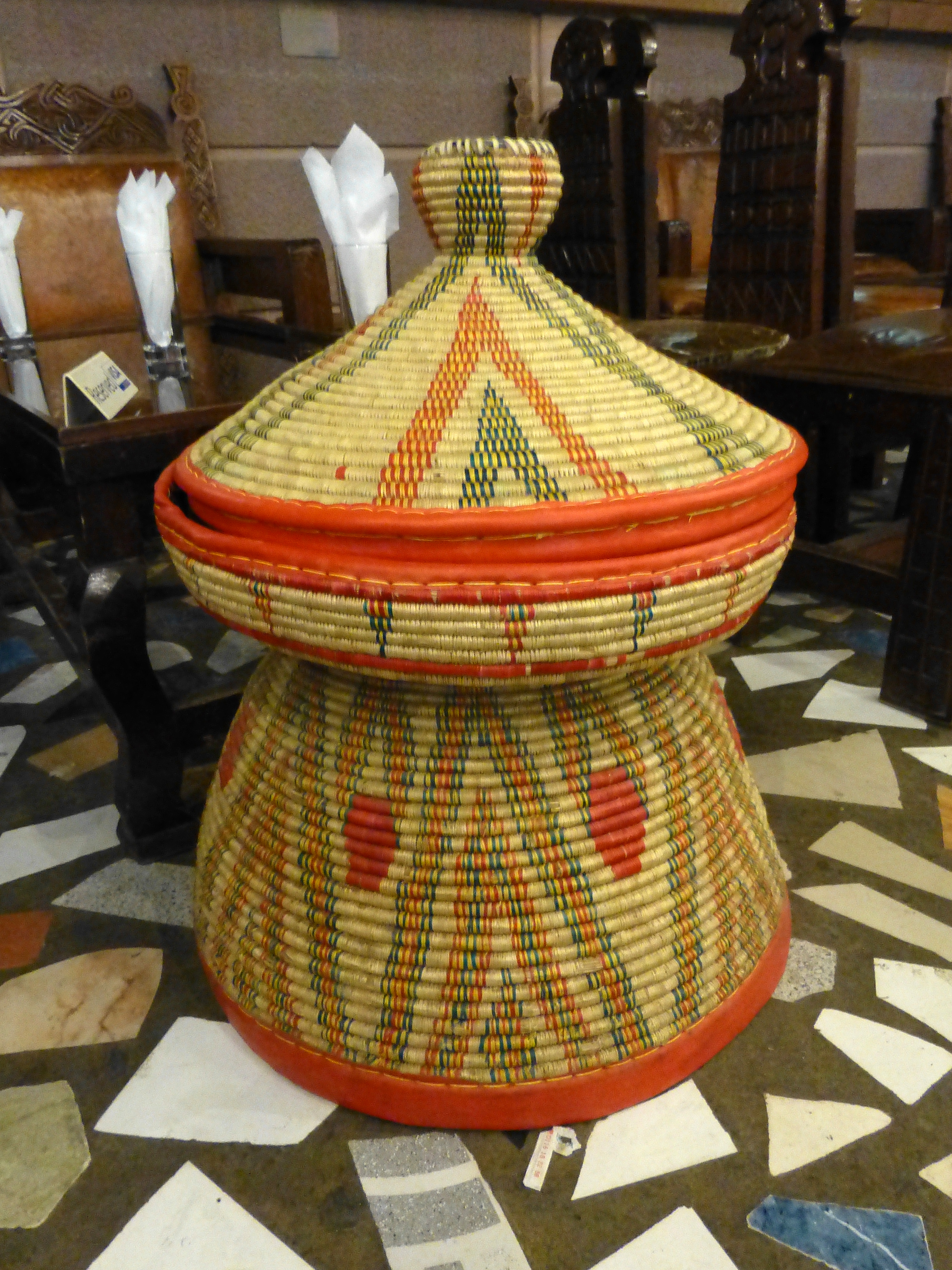 Addis-Abeba (Ethiopie) : table basse en vannerie colorée pour servir l'injera.